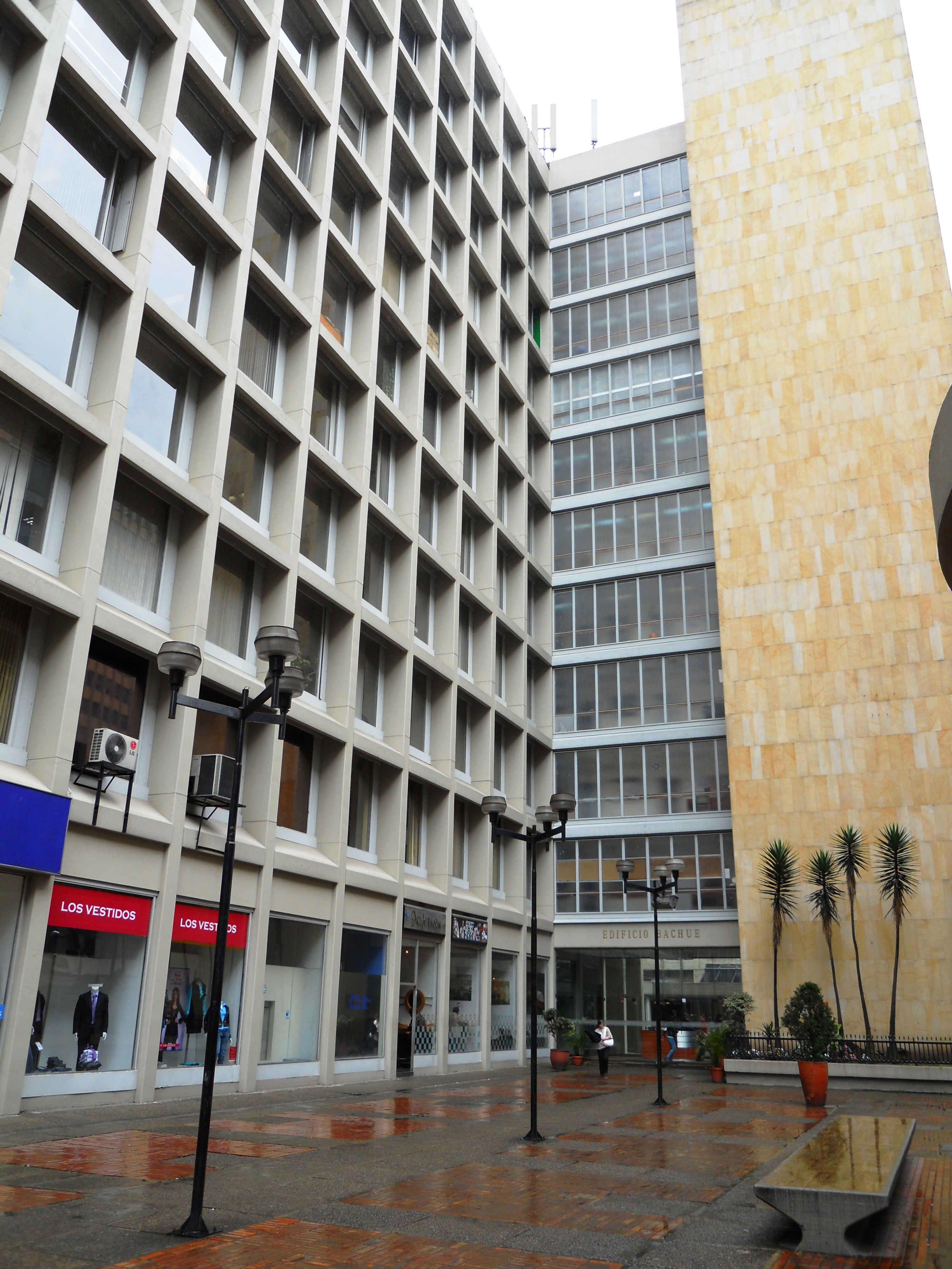 Centro Internacional, costado occidental del edificio Bachué.